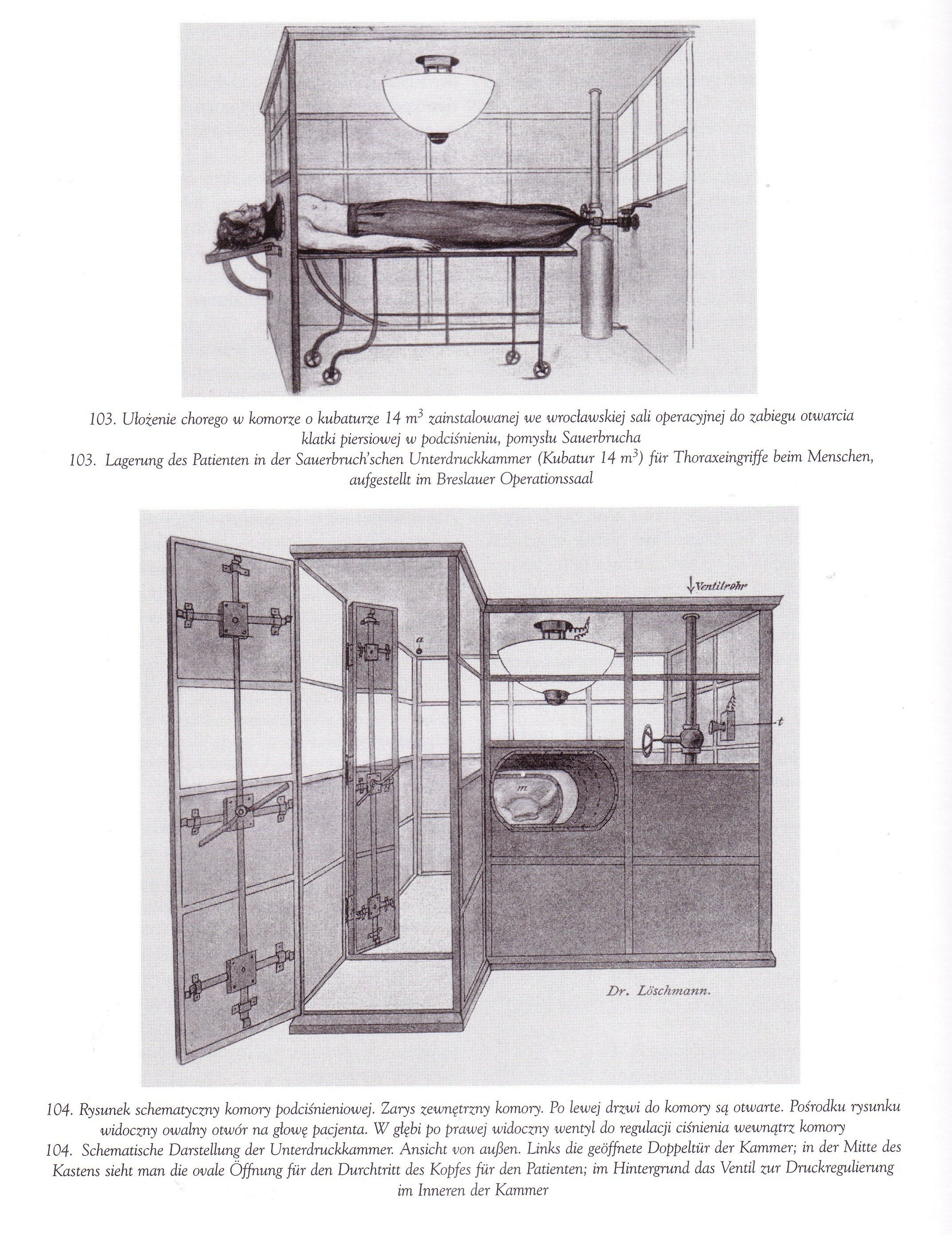 Bauskizze der chirurgischen Unterdruckkammer von Johann von Mikulicz